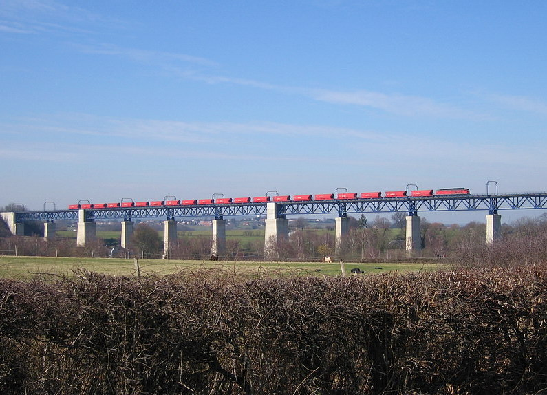 Moresnet Raillon